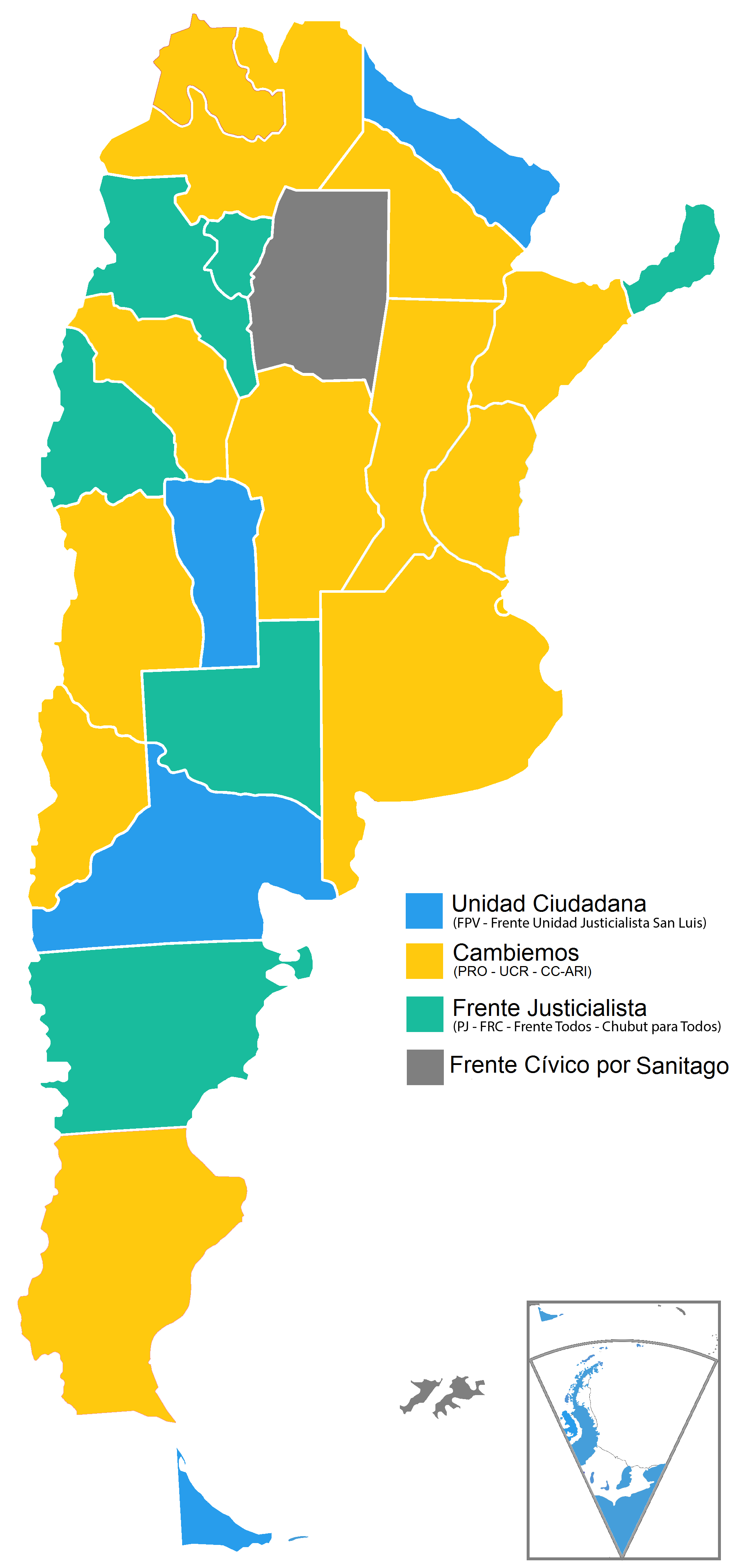 Argentina. Mapa de las elecciones legislativas de 2017 por distrito. Resultados según escrutinio provisorio.